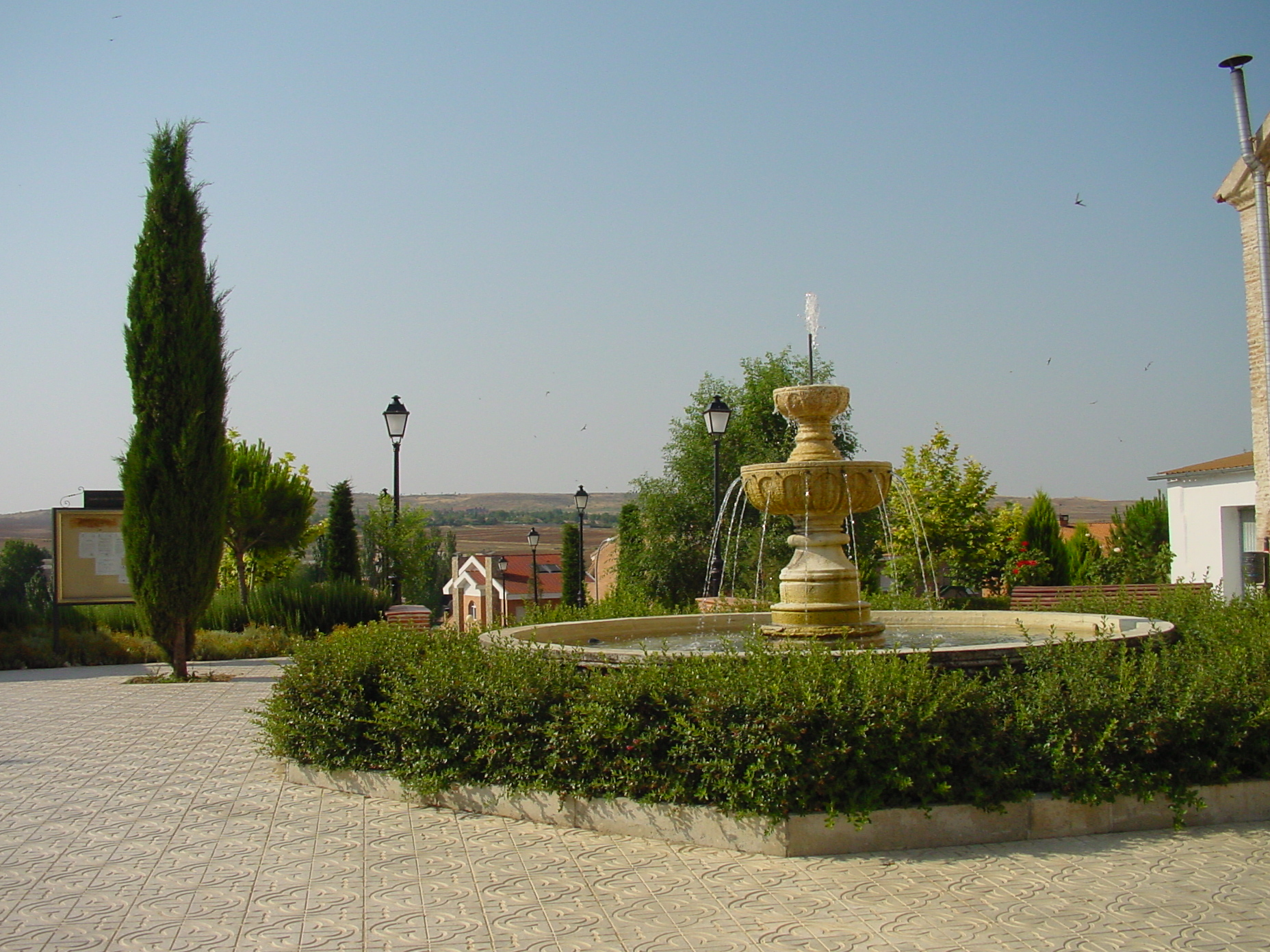 Plaza con fuente en Valdeolmos.